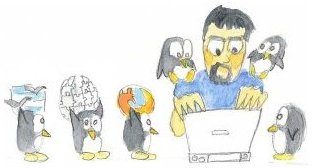 Dessin réalisée par Pfelelep pour Framasoft.